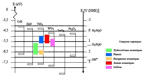 Je suis l'auteur de cette image